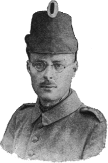 Description